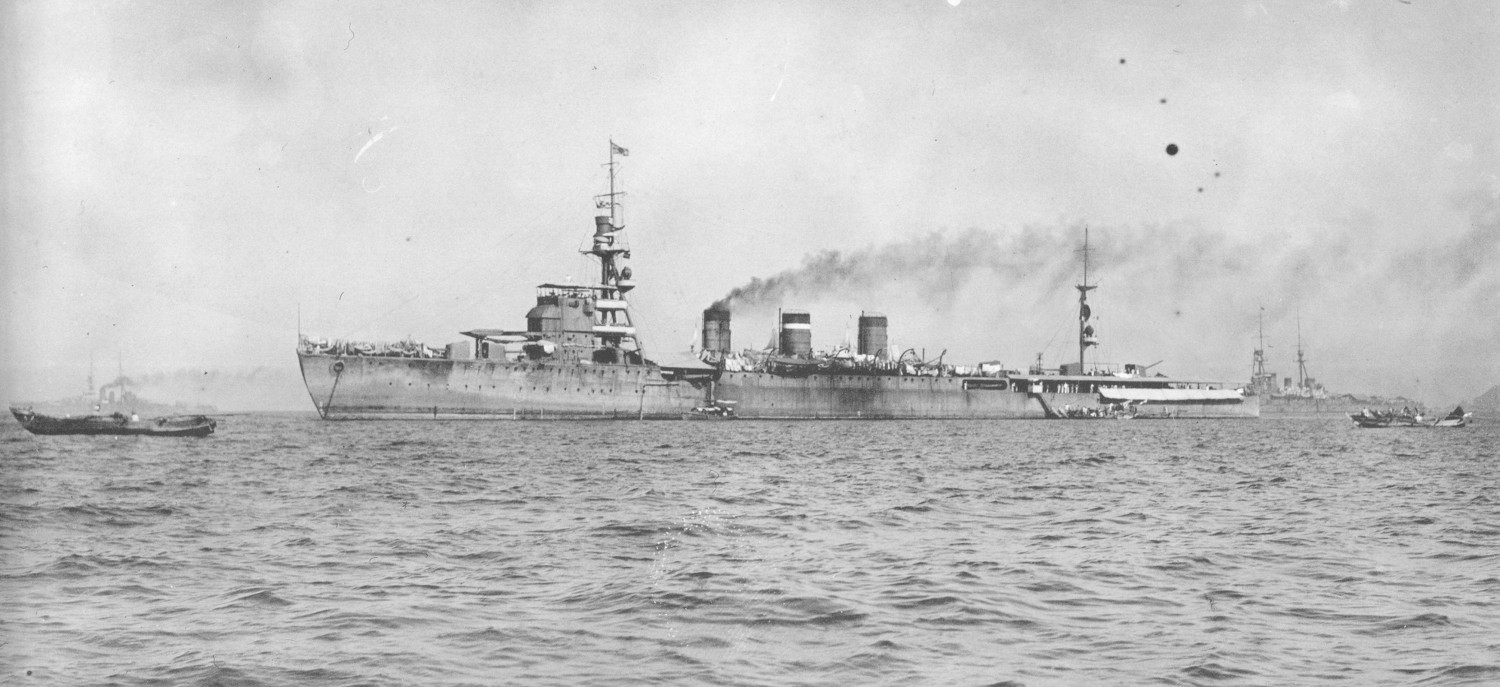 1923年(大正12年)8月初旬、館山湾に碇泊中の由良。